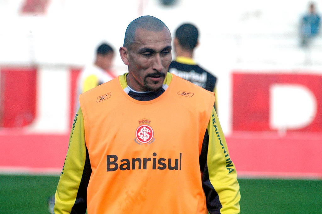 Guiñazu